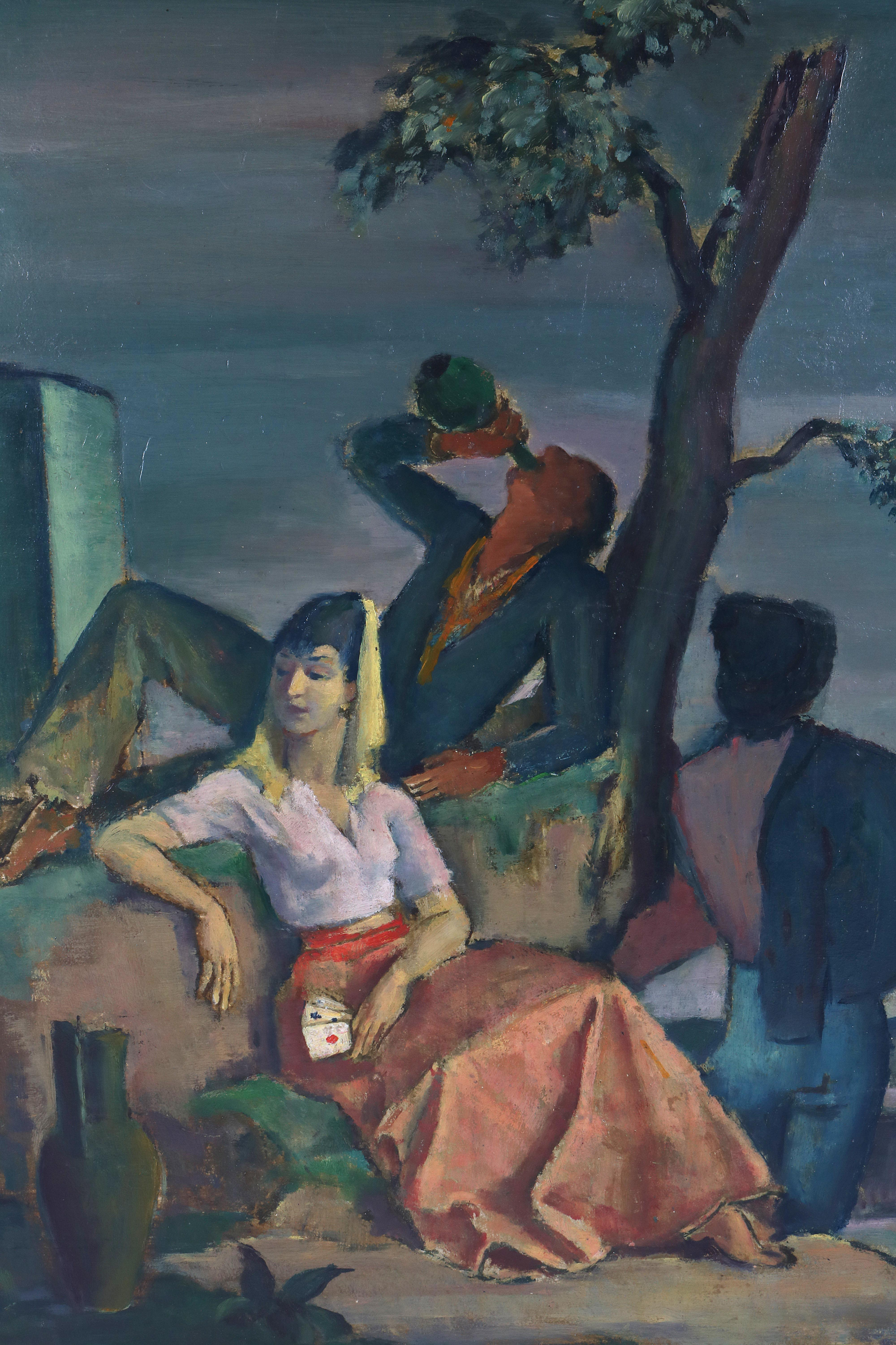 Alfred Hagel - Siesta. (Ruhende Männer und eine Kartenleserin in einem südländischem Dorf), Öl auf Karton, rückseitig Signaturstempel Alfred Hagel ca. 42 x 37 cm